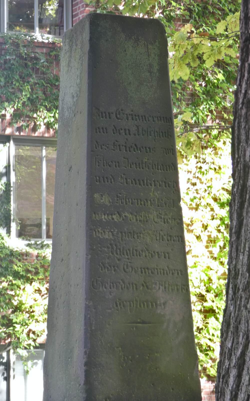 Inschrift auf der Südseite des Kriegerdenkmals in Gehrden